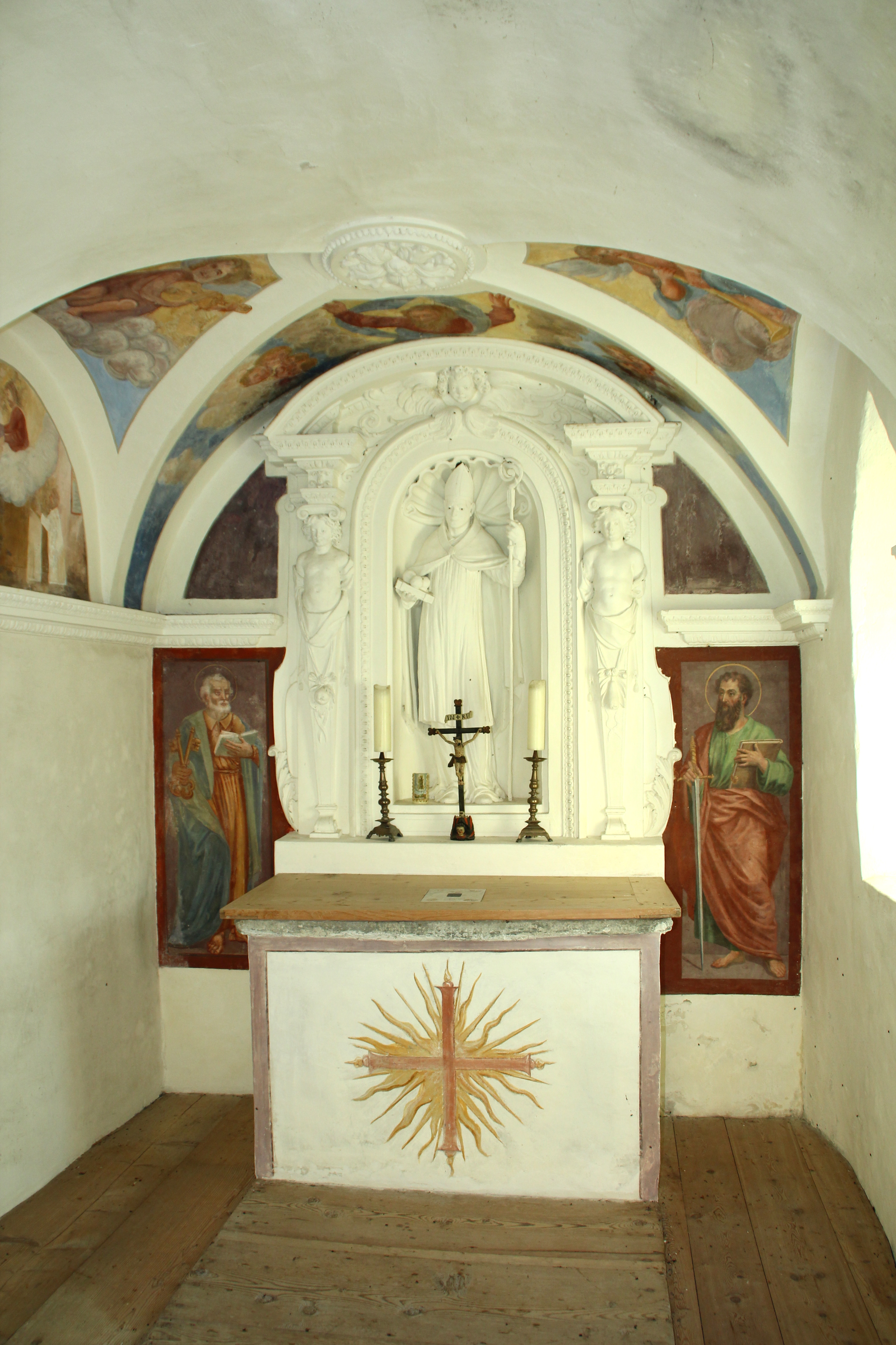 Kapelle St. Nikolaus (Vals)